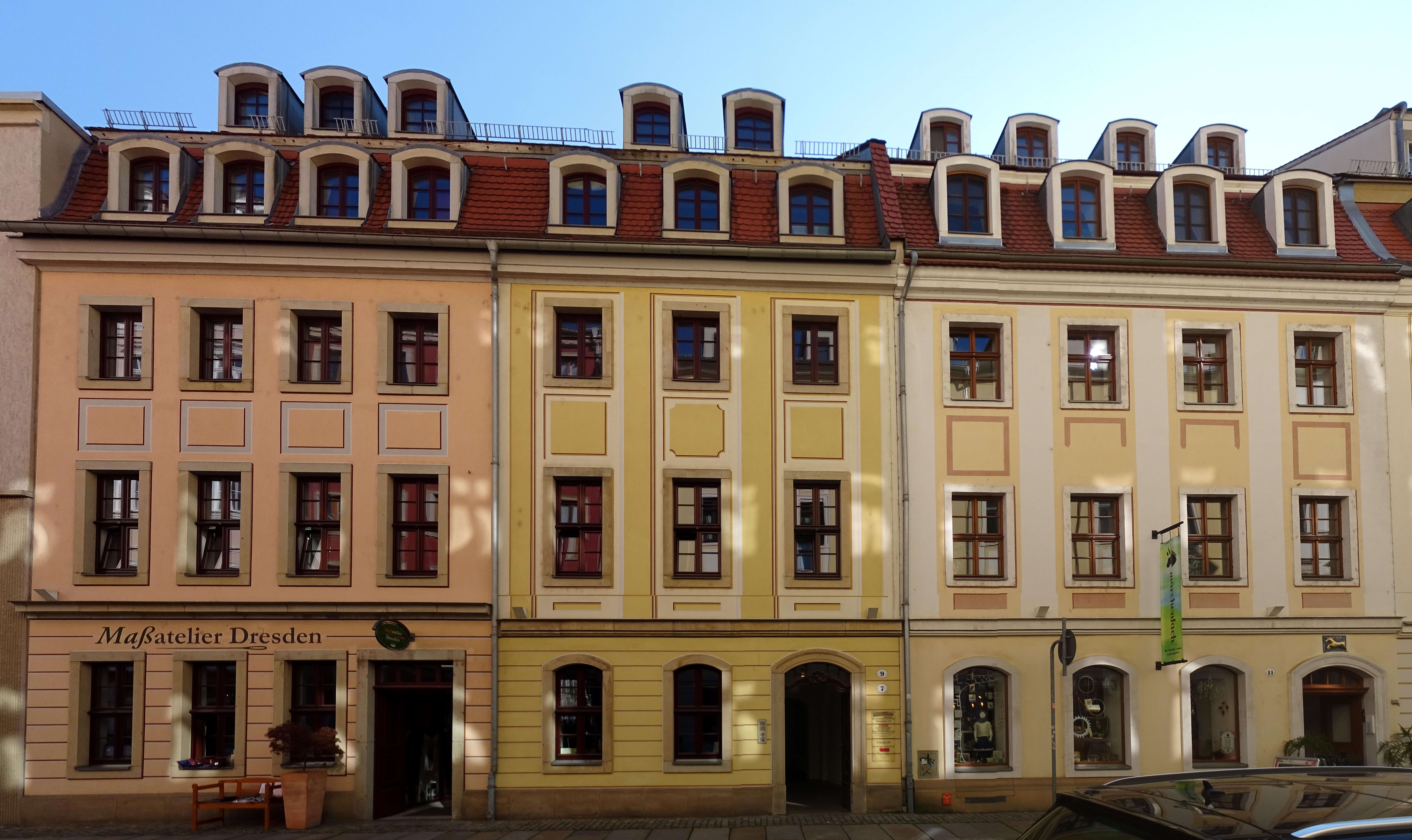 Wohngebäude Obergraben 7 bis 11 (v.l.n.r.), Innere Neustadt, Dresden